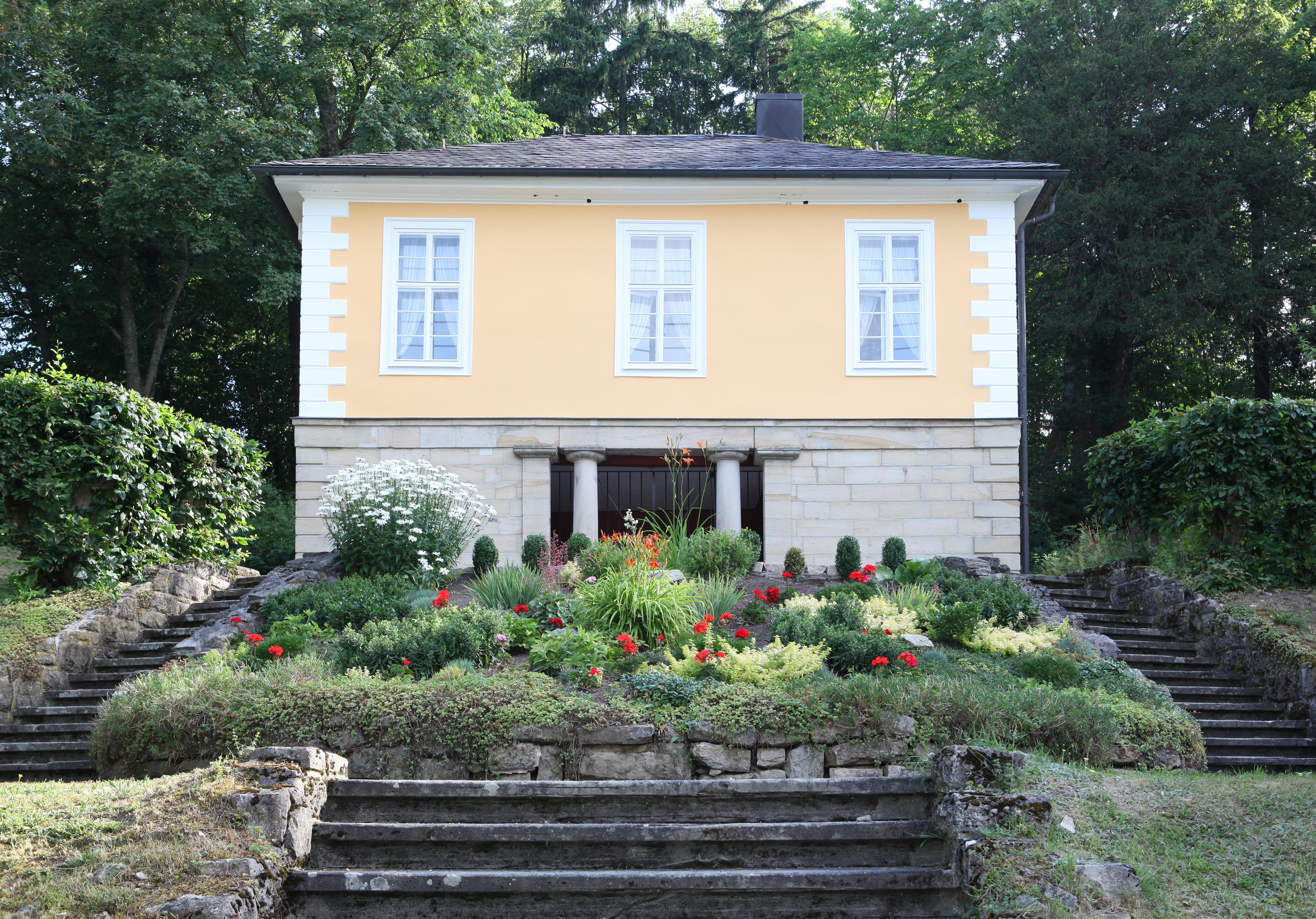 Gartenhaus von Otto Ludwig, Eisfeld